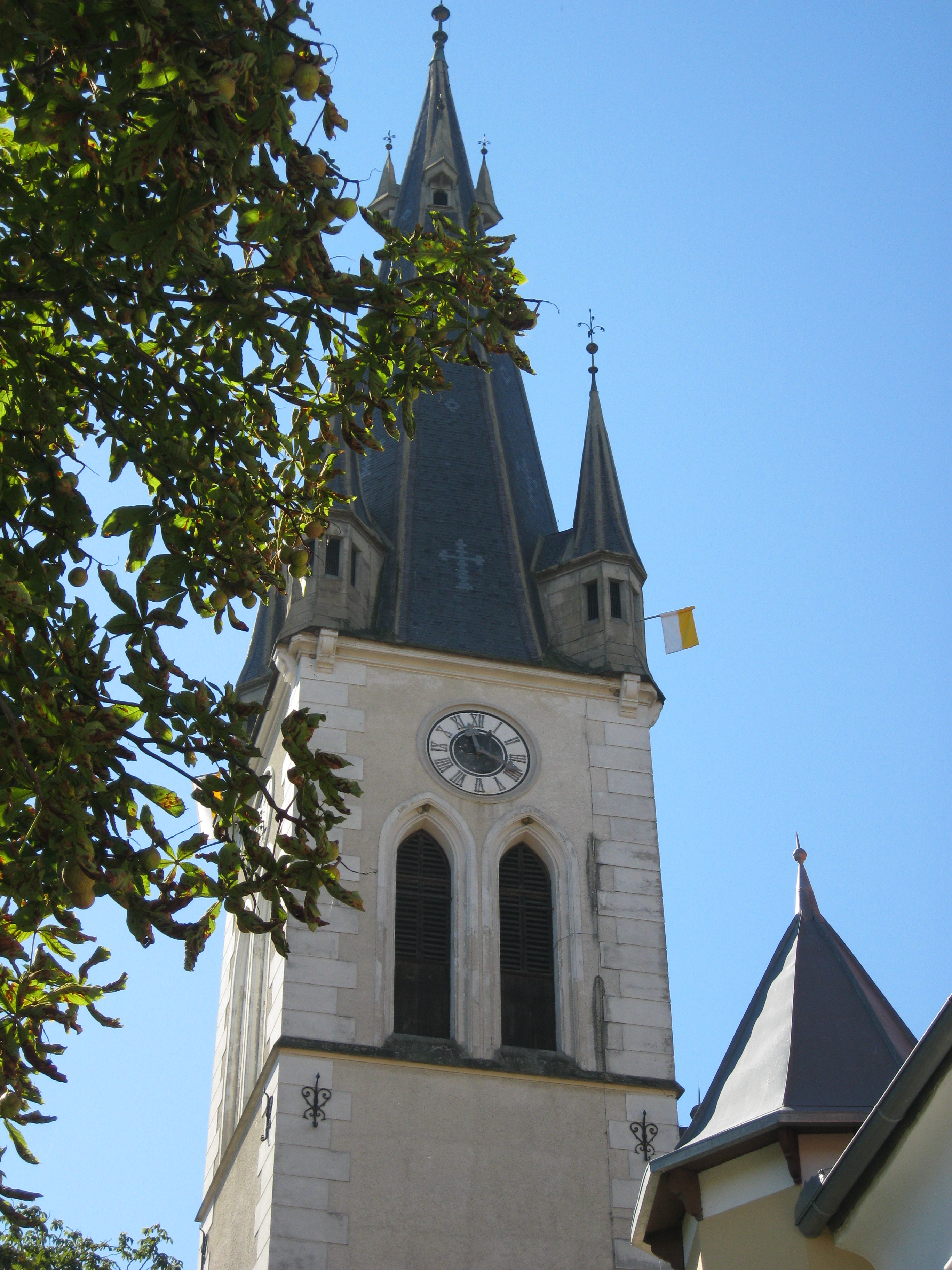 Pfarrkirche hl. Veit Weißkirchen, Steiermark Dieses Foto wurde im Rahmen des von Wikimedia Österreich unterstützten Projekts Wiki takes oberes Murtal erstellt. The making of this work was supported by Wikimedia Austria. For other files made with the support of Wikimedia Austria, please see the category Supported by Wikimedia Österreich. Object location47° 09′ 15.6″ N, 14° 44′ 17.99″ E